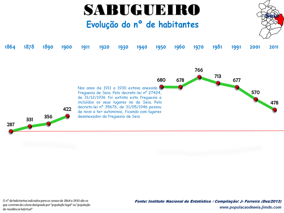 Evolução da População 1864 / 2011